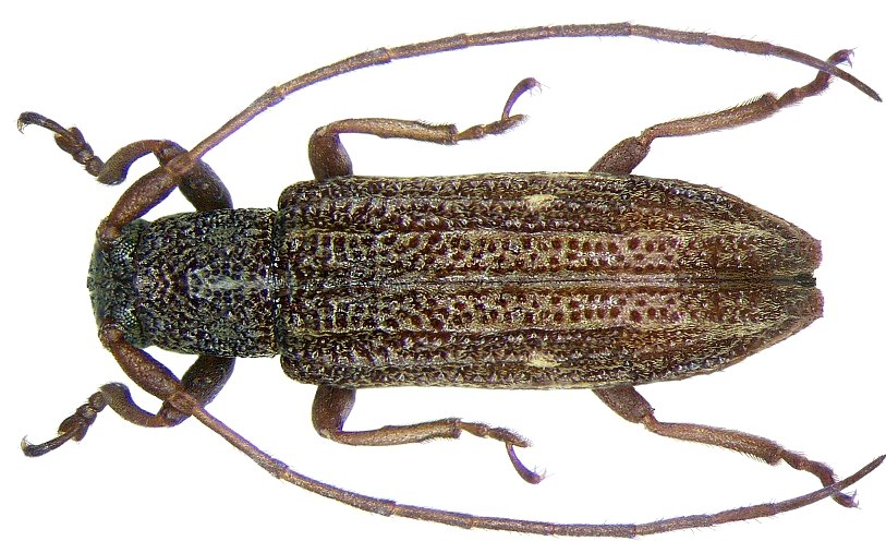 Familie: Cerambycidae Groesse: 6,2 mm Fundort: Indien, Kurseong, Darjeeling det. Breuning, 1873 Type, Museum Paris Photo: U.Schmidt, 2007